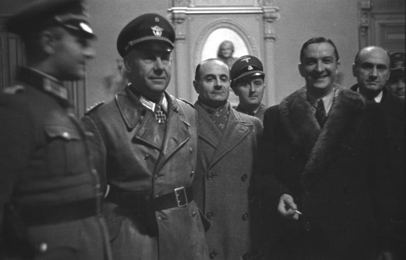 Information added by Wikimedia users.Marseille, 23. Januar 1943: deutsch-französische Besprechung im Hôtel de Ville. v.l.n.r.: unbekannt; SS-Sturmbannführer (oder besser Standartenführer ?) und Oberst der Polizei Bernhard Griese, Antoine Lemoine (Regionalpräfekt), Rolf Mühler (Kommandeur der Sicherheitspolizei Marseille), René Bousquet (Generalsekretär der Vichy-Polizei), Pierre Barraud (Bürgermeister von Marseille)